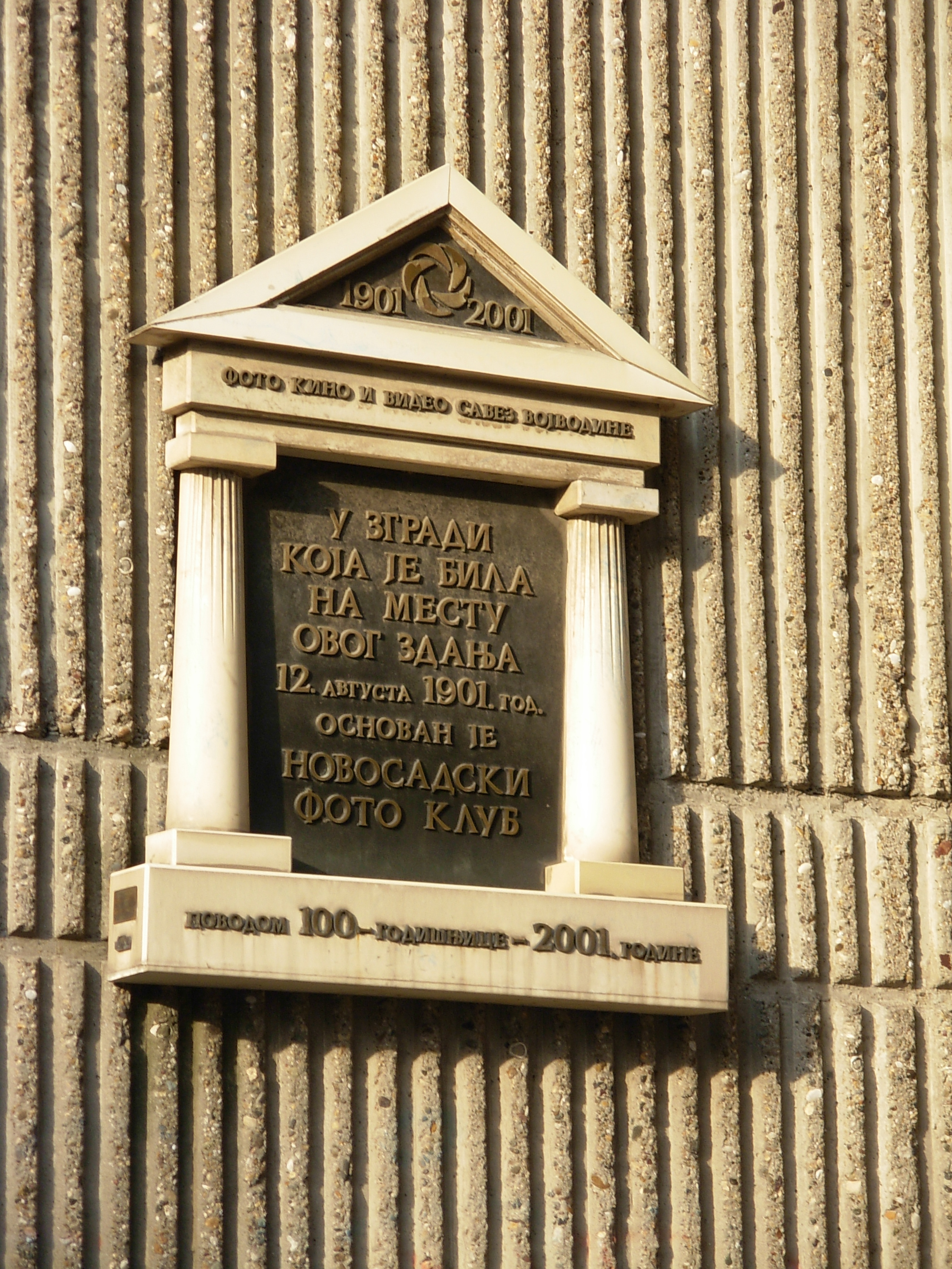 Tabla na zgradi koja se nalazi na mestu gde je osnovan Novosadski foto klub 12. avgusta 1901. godine.